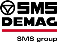 Altes Logo der SMS Demag AG (heute SMS Siemag AG)